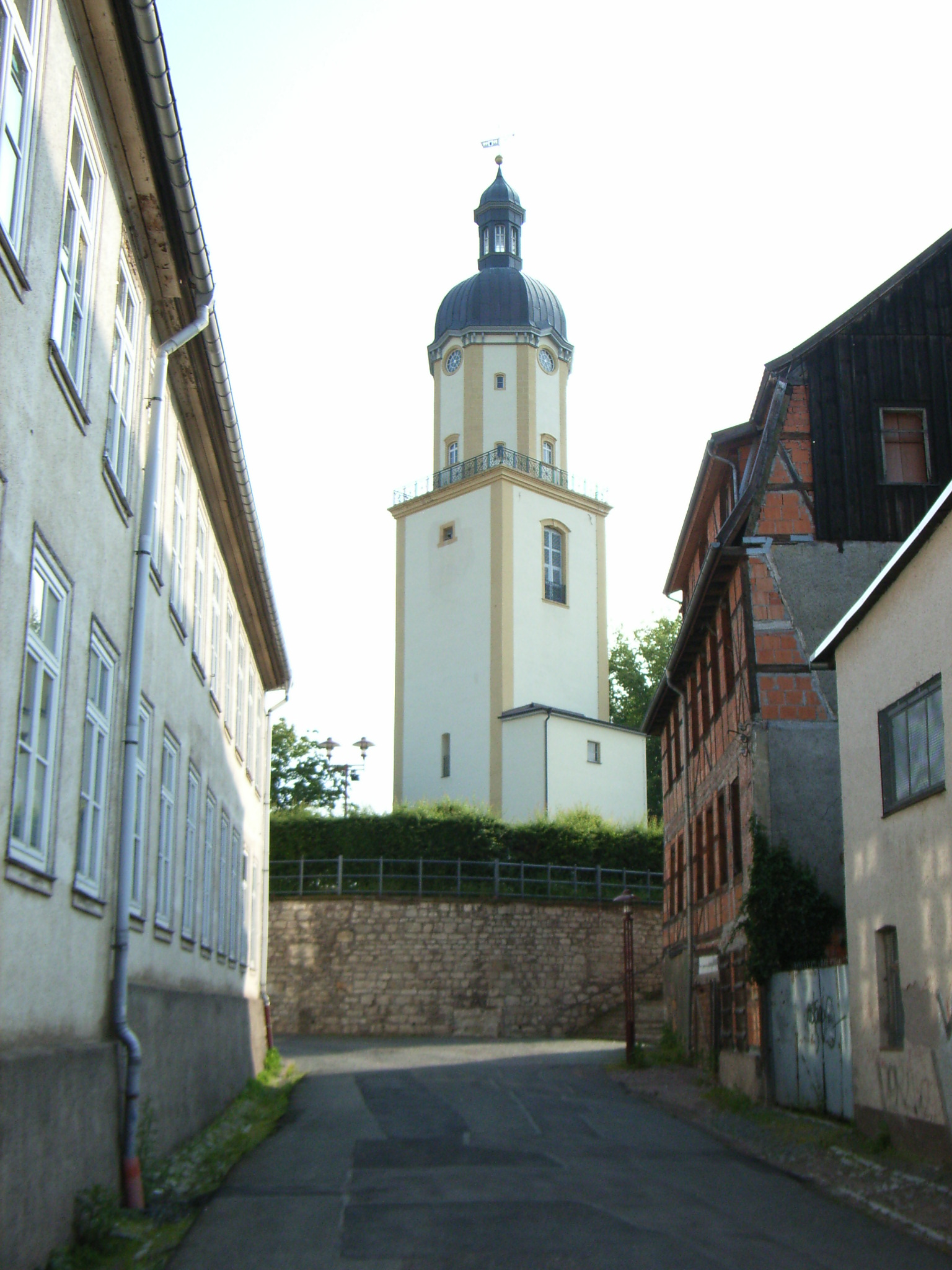 Ohrdruf, Michaelkirche